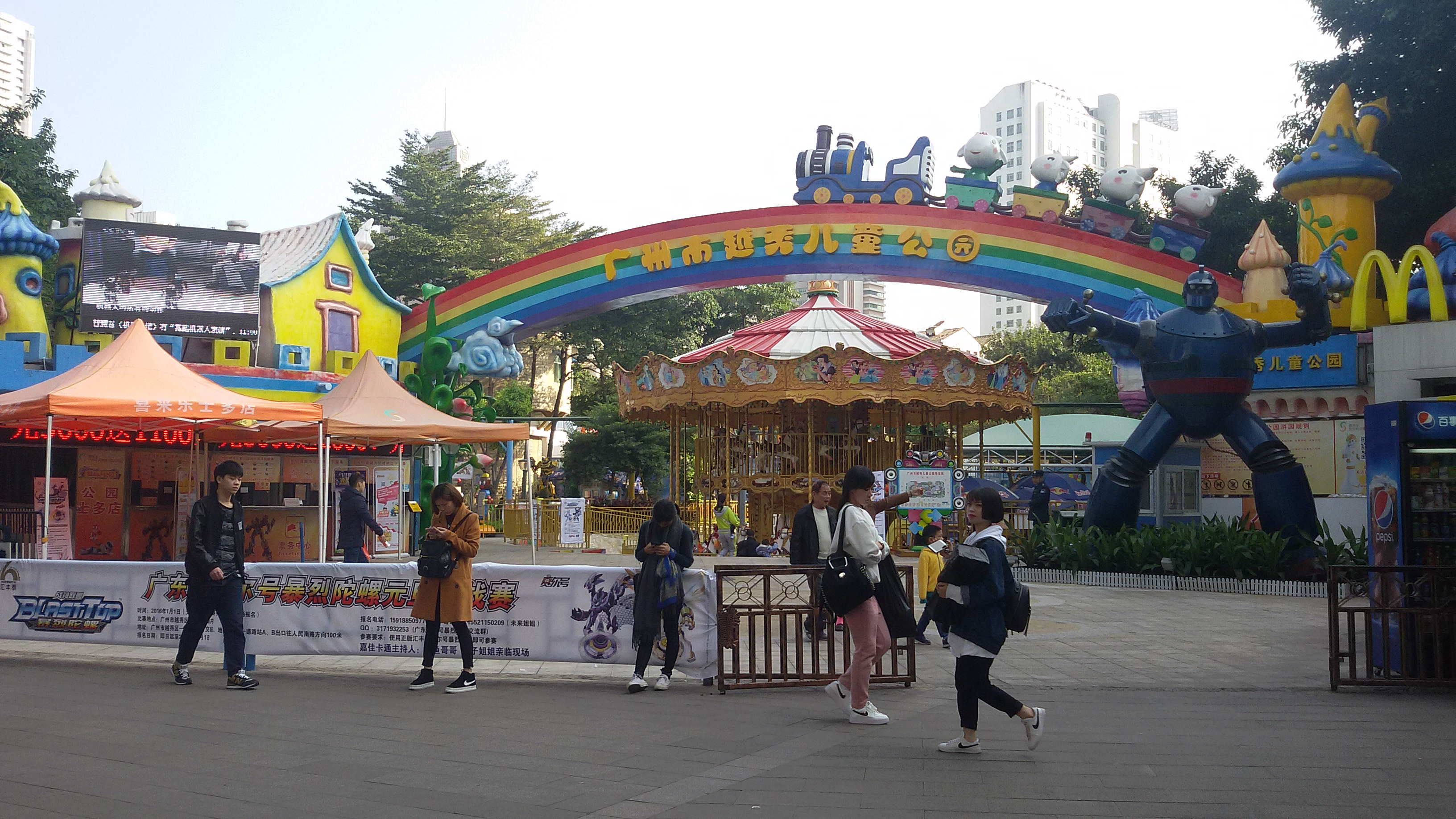 粵語: 越秀區兒童公園正門